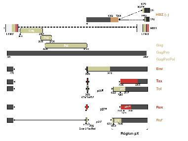 RegionpX